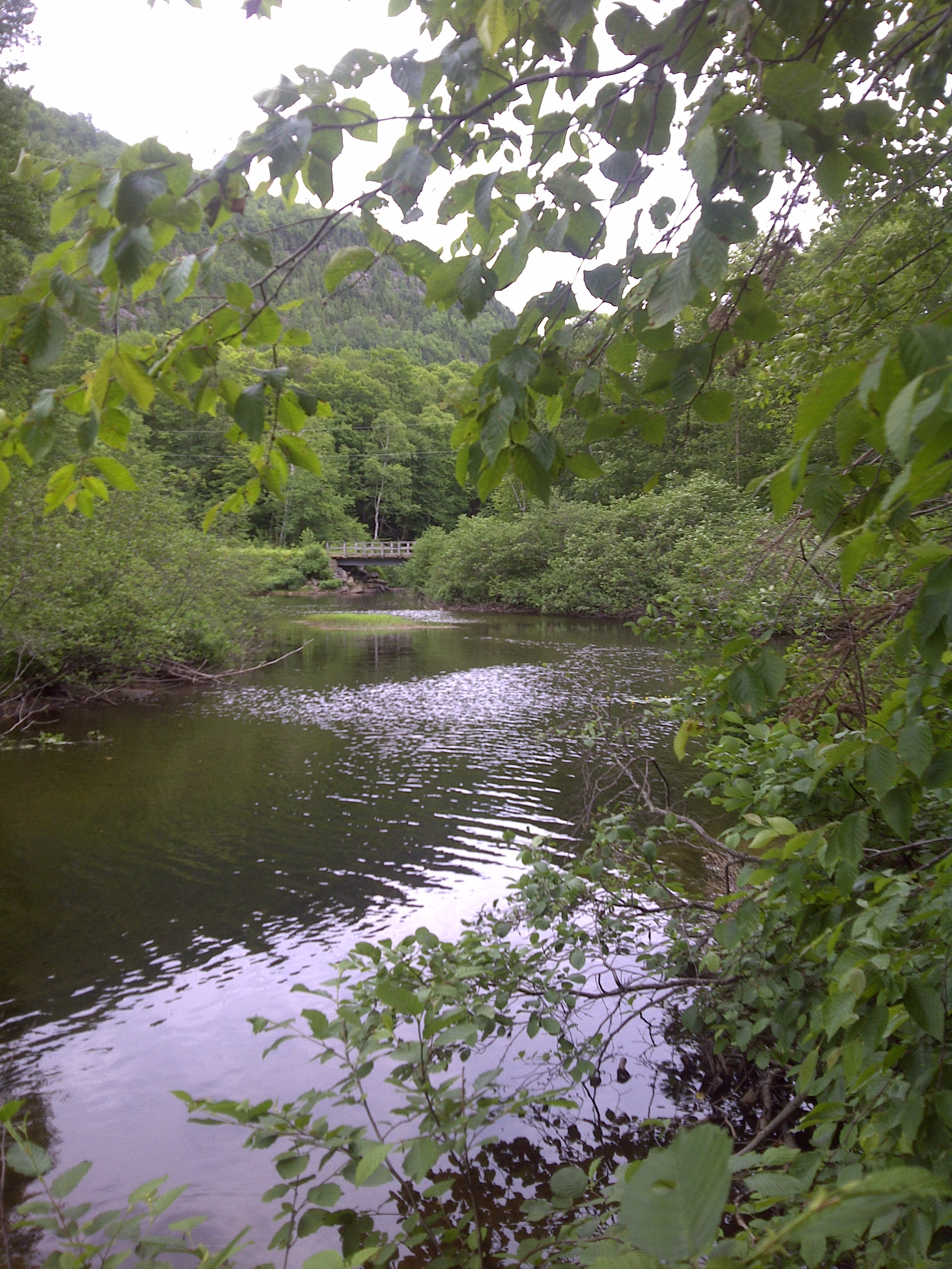 Pont reliant les deux rives du Lac du Missionnaire (QC, Canada), au-dessus de la passe-à-Groleau.